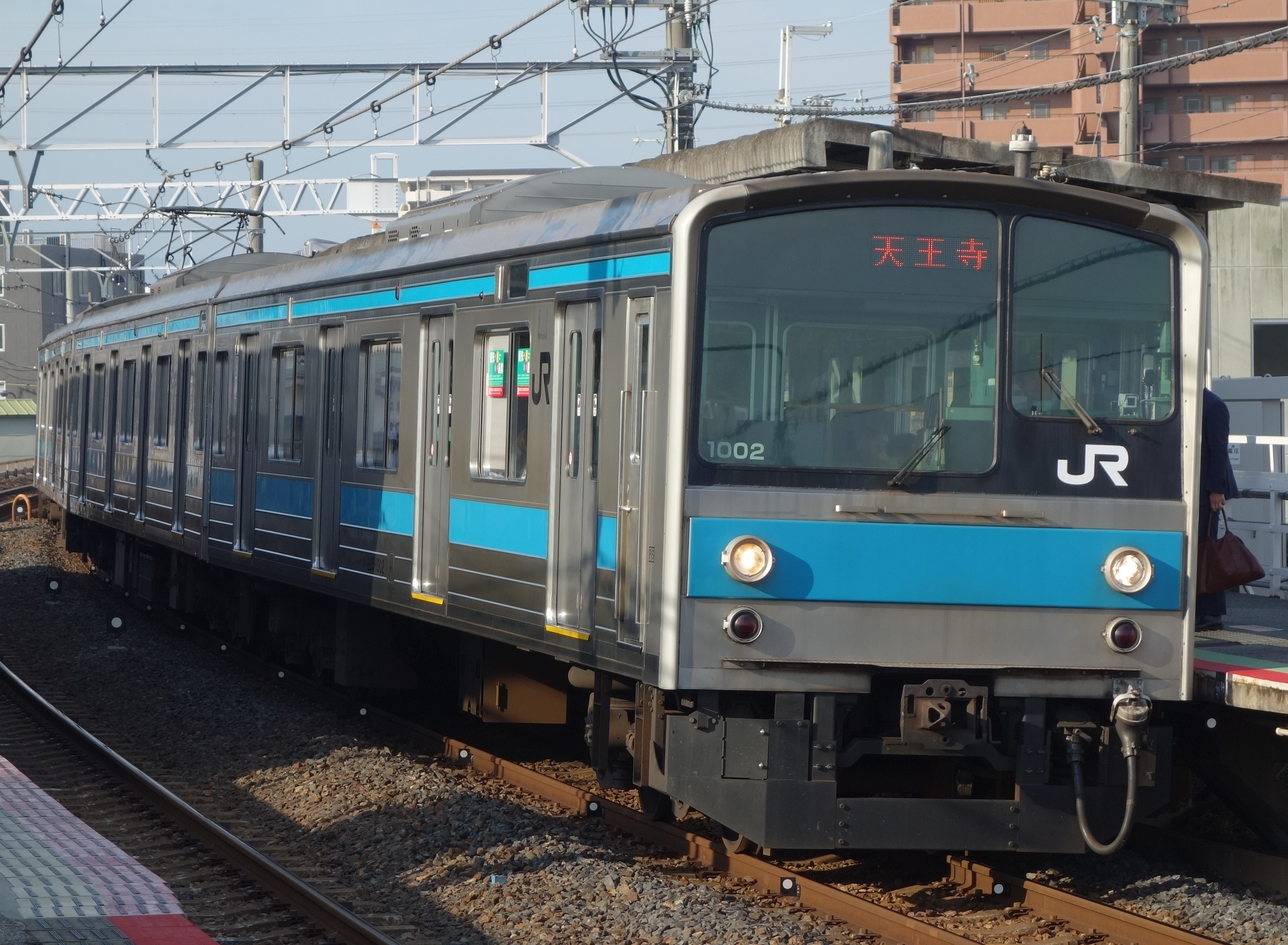 205系1000番台体質改善工事車 (2016年6月6日浅香駅)